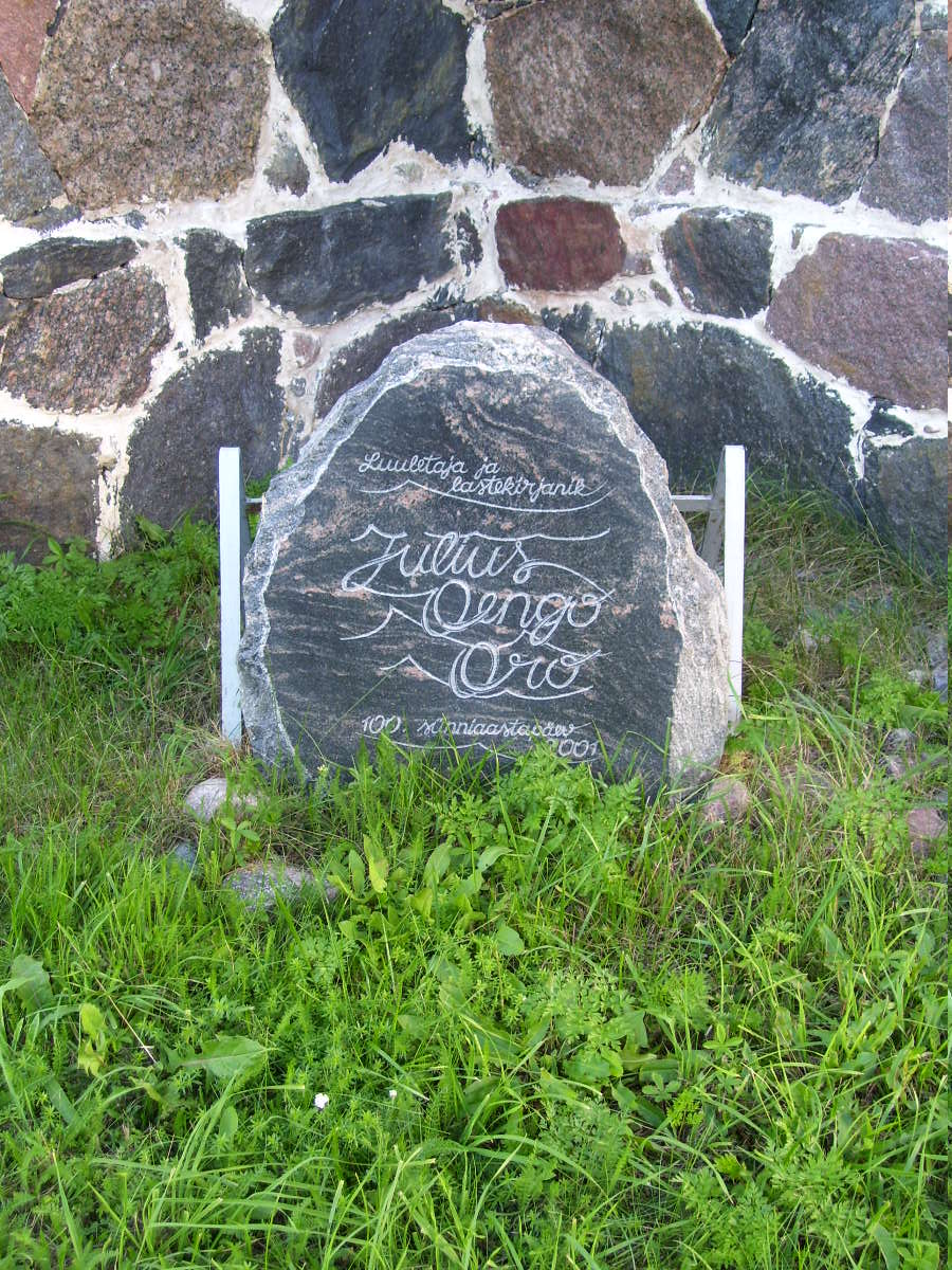 Mälestustahvel Julius Oengole Kuri koolihoone seina juures